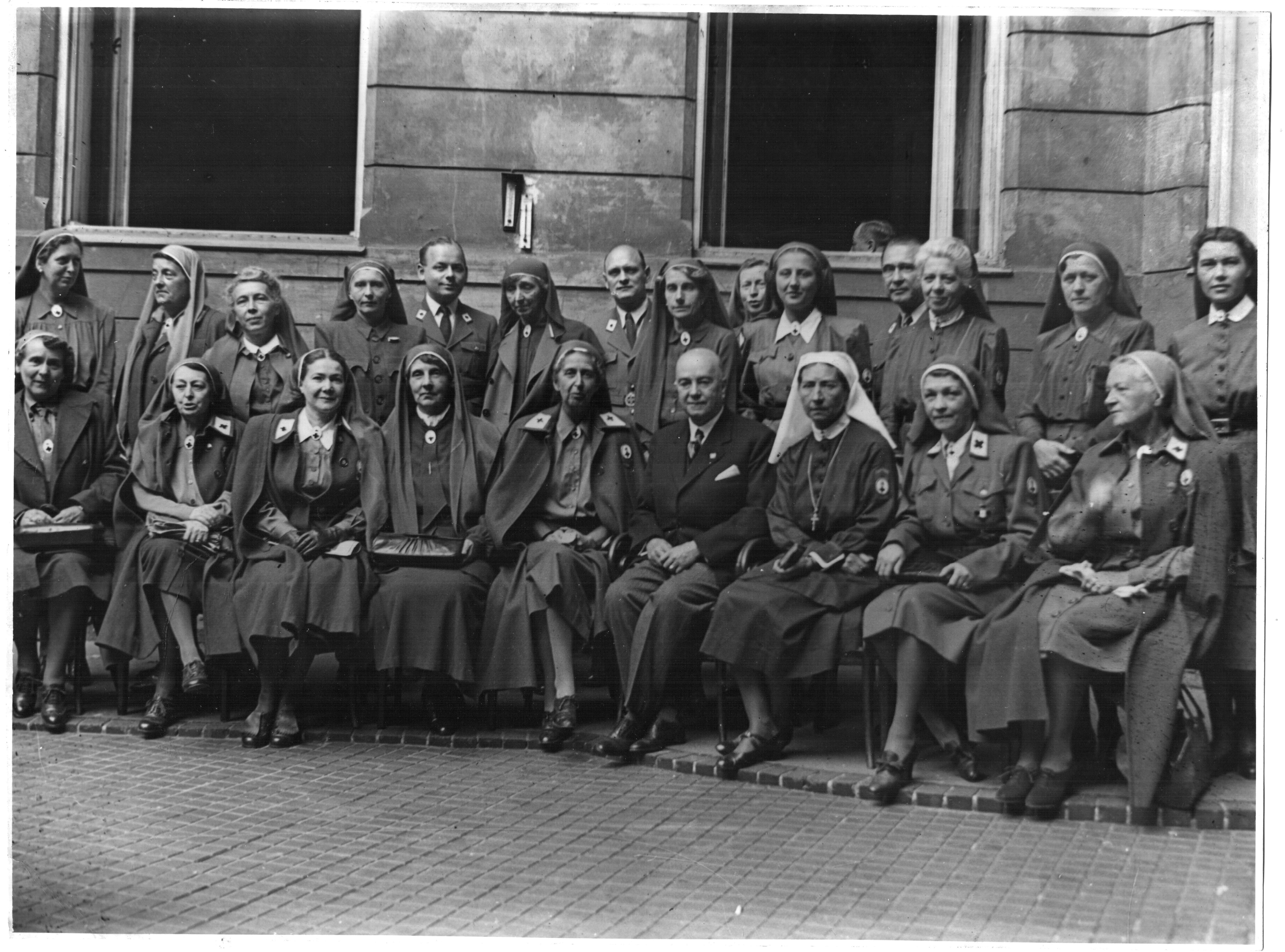 A felvétel 1943. szeptember 15 -én készült. Ismeretlen fényképész munkája. Mérete: 22,8 cm x 16,9 cm. A fénykép hátoldalán levő kézzel írt szöveg: Főápolói értekezlet. Budapest Baross u. 15 sz. 1943 szept. 15 én. Bélyegző: Magyar Fotóriport Iroda ….tul Szécsy István Baross szöv. tag Budapest, VII. Dohány u. 3... cimkék: Magyar Fotóriport Iroda 1943 Főápolói értekezlet 1943.09.15 Szécsy István ©© Derzsi Elekes Andor, Budapest, 2014, A kép és filmfelvételek egészben, vagy részletekben másolását, bármilyen úton történő sokszorosítását és felhasználását a szerző ellenérték nélkül, jogutódjaira is kihatóan megengedi. Az engedély kiterjed a kereskedelmi célú hasznosításra is. Kéri azonban nevének feltüntetését a felhasználás során. A Metapolisz sorozat valamennyi képe és filmje Creative Commons alatti valamint kereskedelmi - for profit - célra is felhasználható. Ajánlott hivatkozás: Derzsi Elekes Andor: Metapolisz DVD line